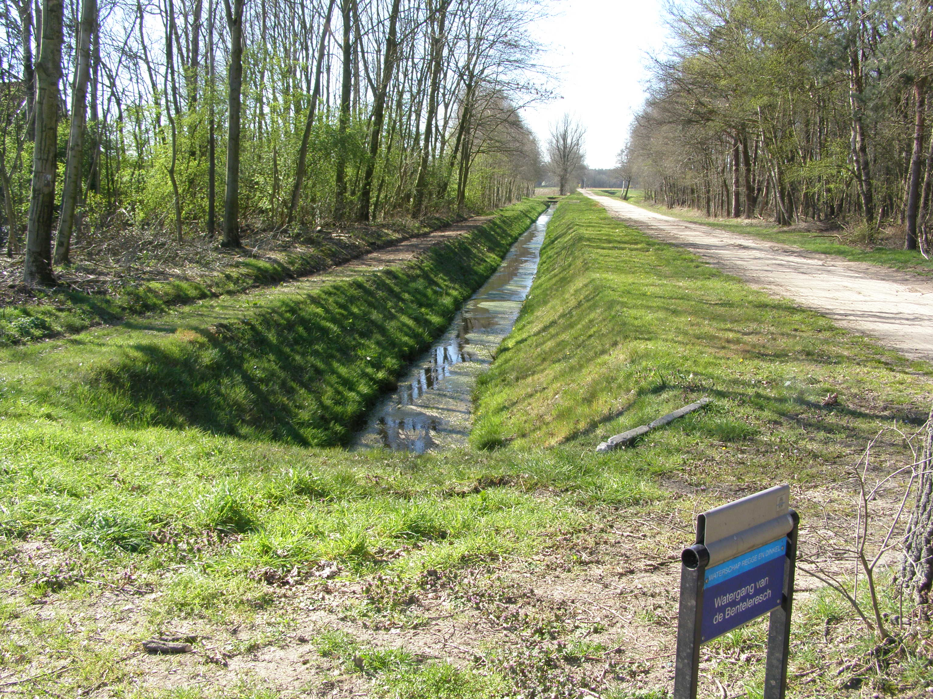 De Watergang van de Benteleres nabij de Beldsweg tussen Hengevelde en Delden. eigen werk